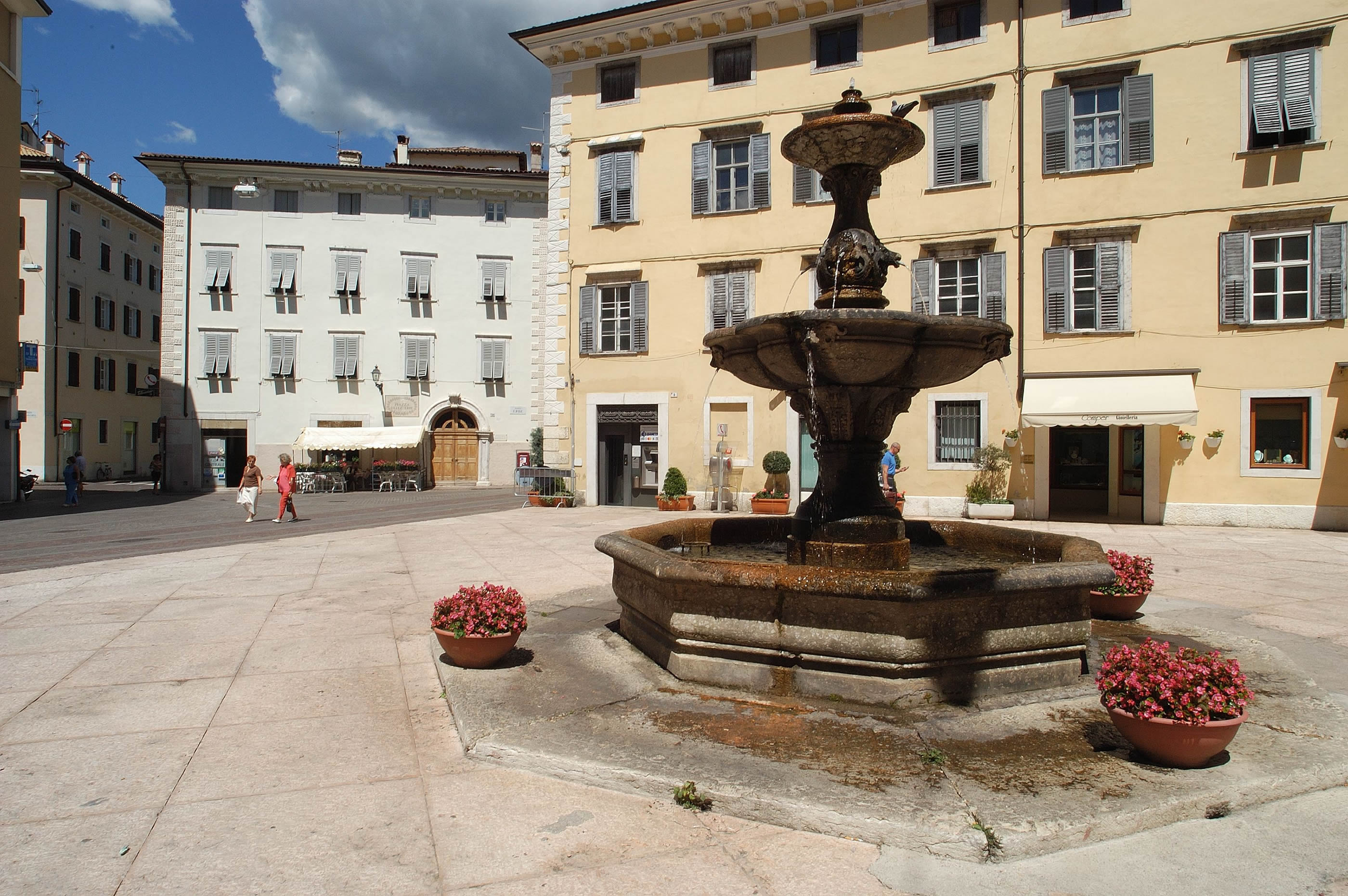 Rovereto, piazza delle Erbe